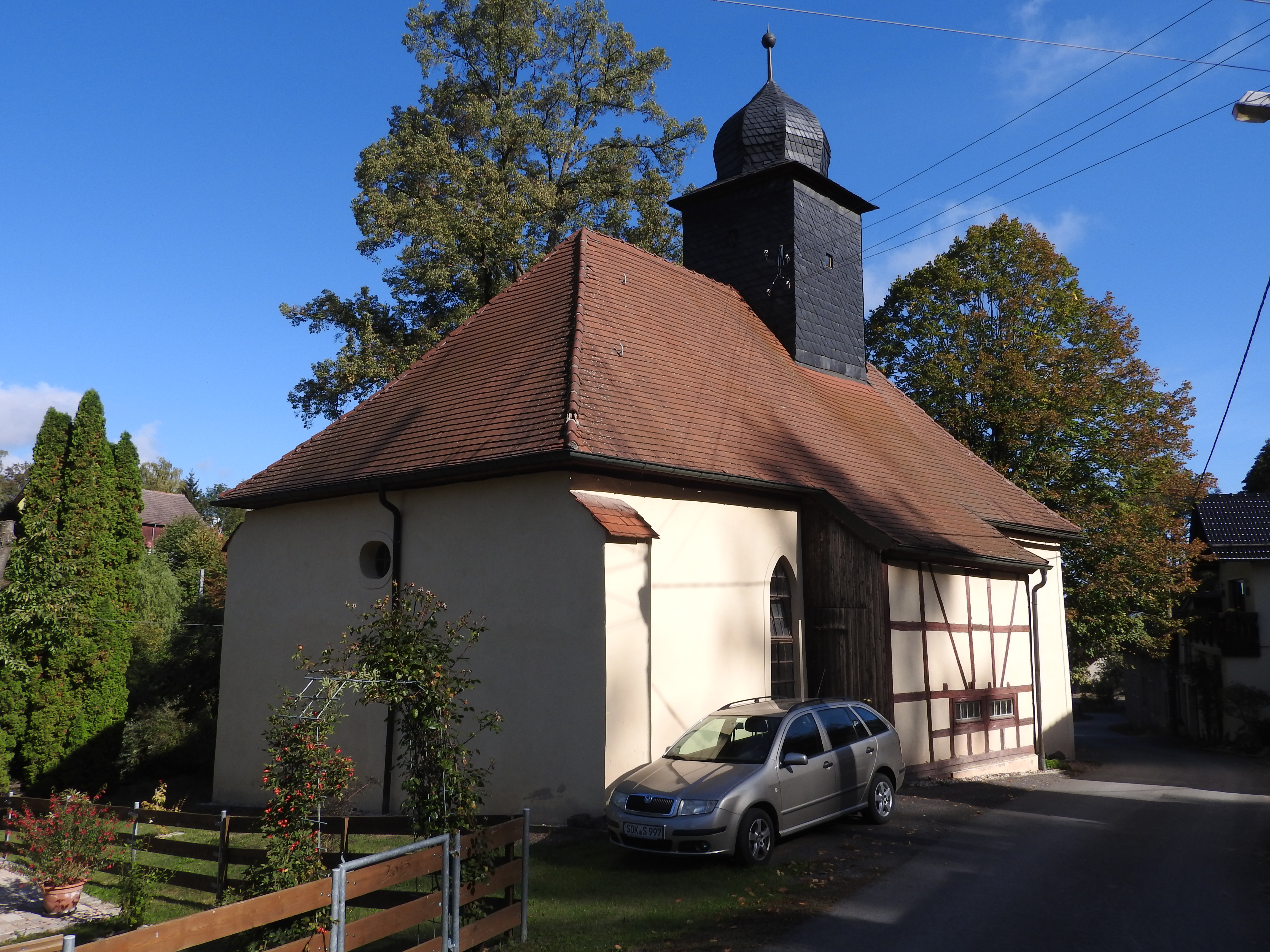 Kirche in Lemnitz, Thüringen